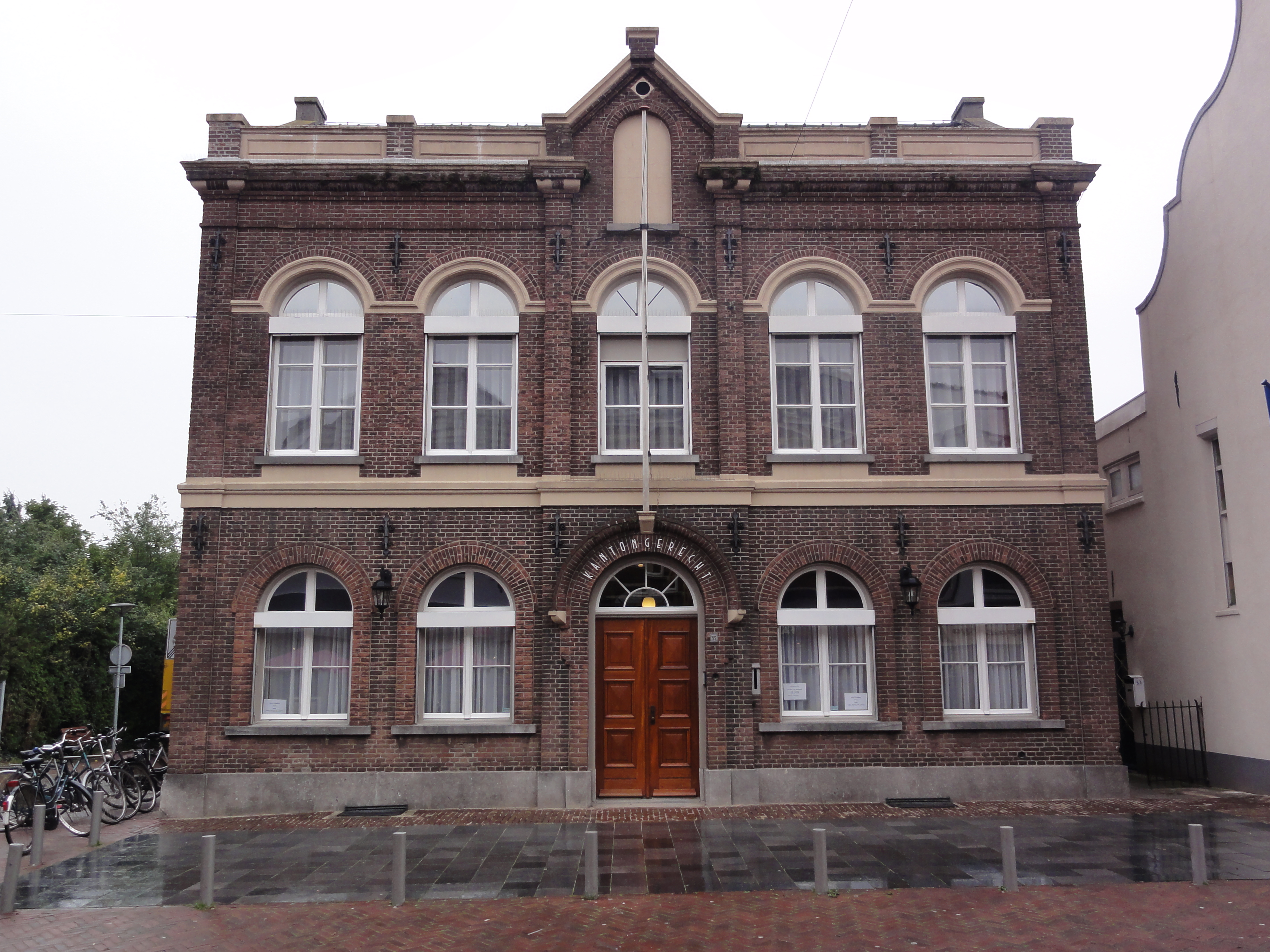 Boxmeer Rijksmonument 518564 kantongerecht Steenstraat 59 07″ N, 5° 57′ 02.69″ E